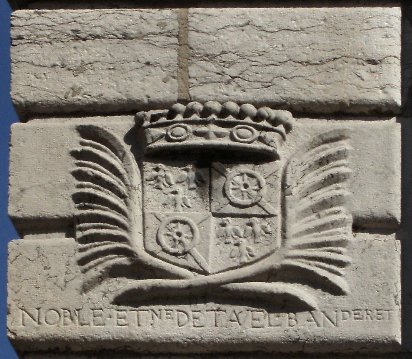 Vevey (Suisse) - Hôtel de Ville. Détail de l'angle supérieur gauche de la façade principale.